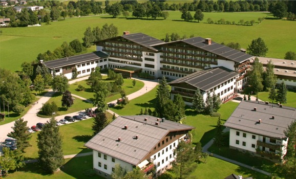 Saalfelden REHAB